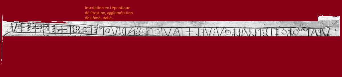 Inscription épigraphique en lépontique découverte dans une structure de gradin proto-historique à Prestino, près de Côme, en Lombardie. Première moitié du .